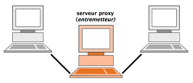 Rôle du serveur proxy dans un réseau simplifié.